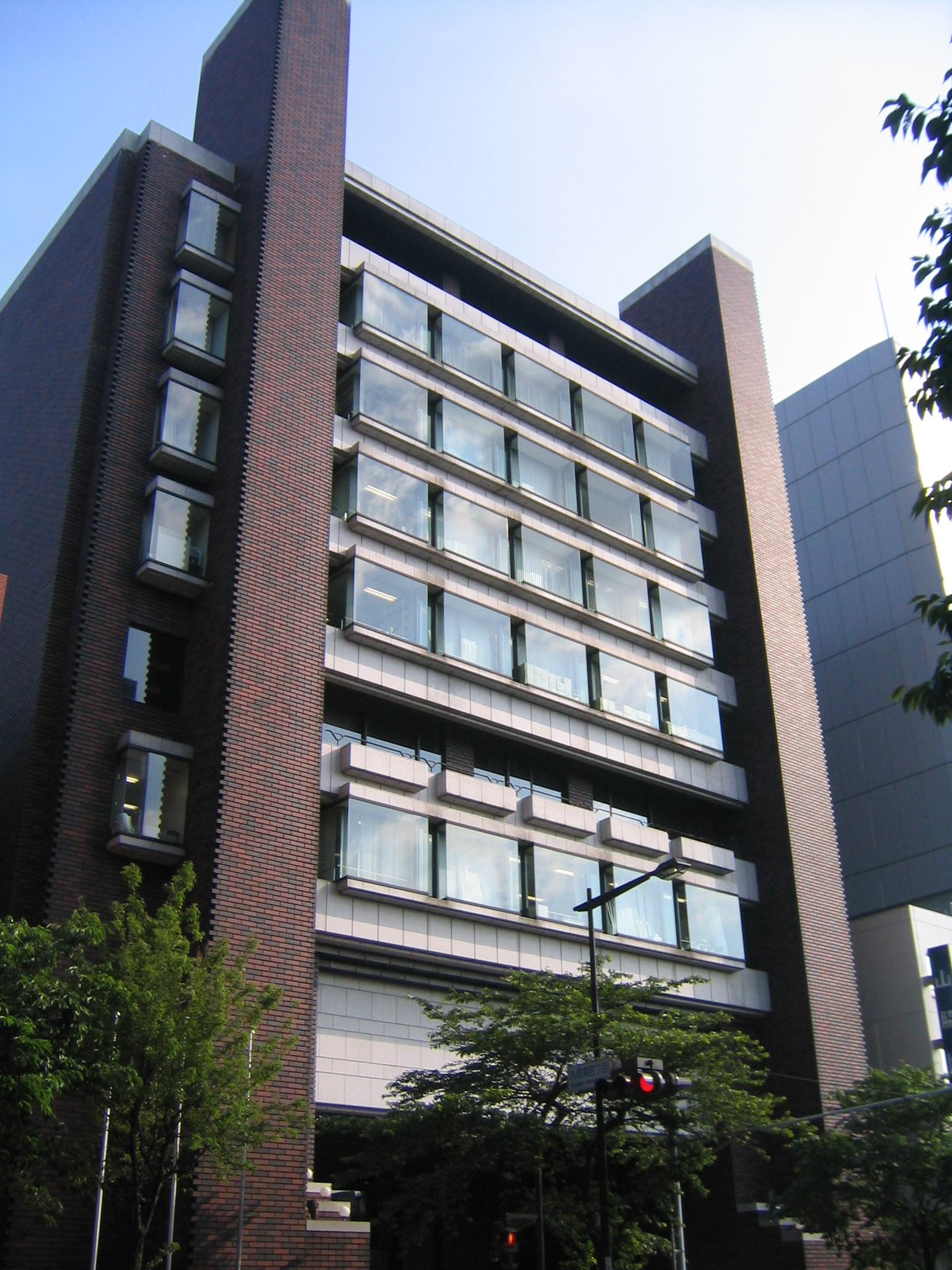 日本大学会館